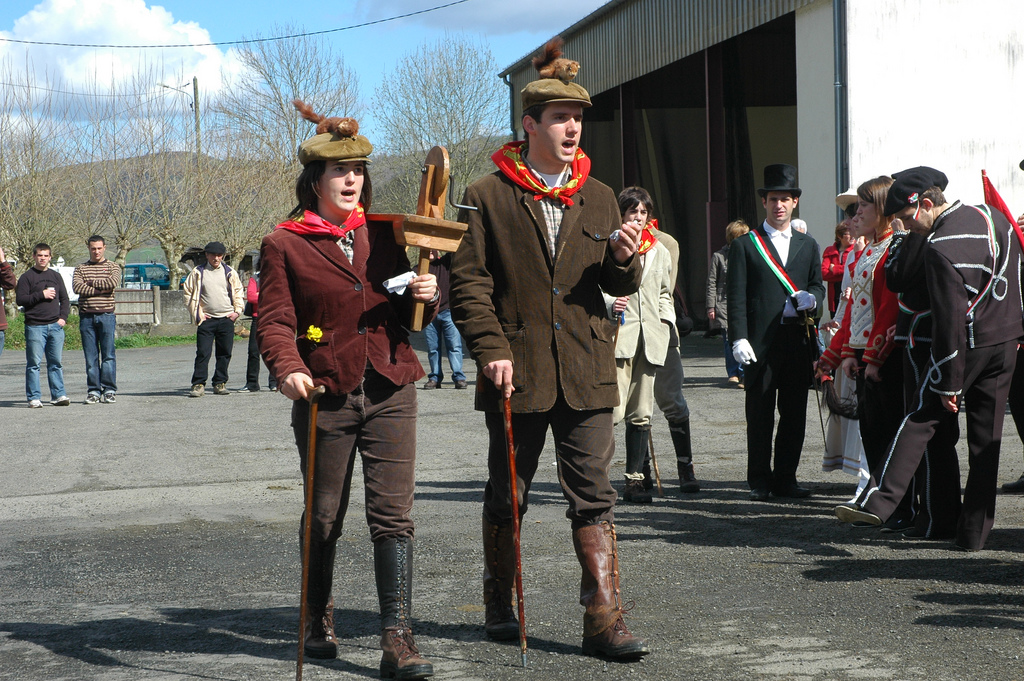 Atharratze-Alozeko Maskaradak Arrokiagan. Xorrotxak. 2008ko martxoak16.